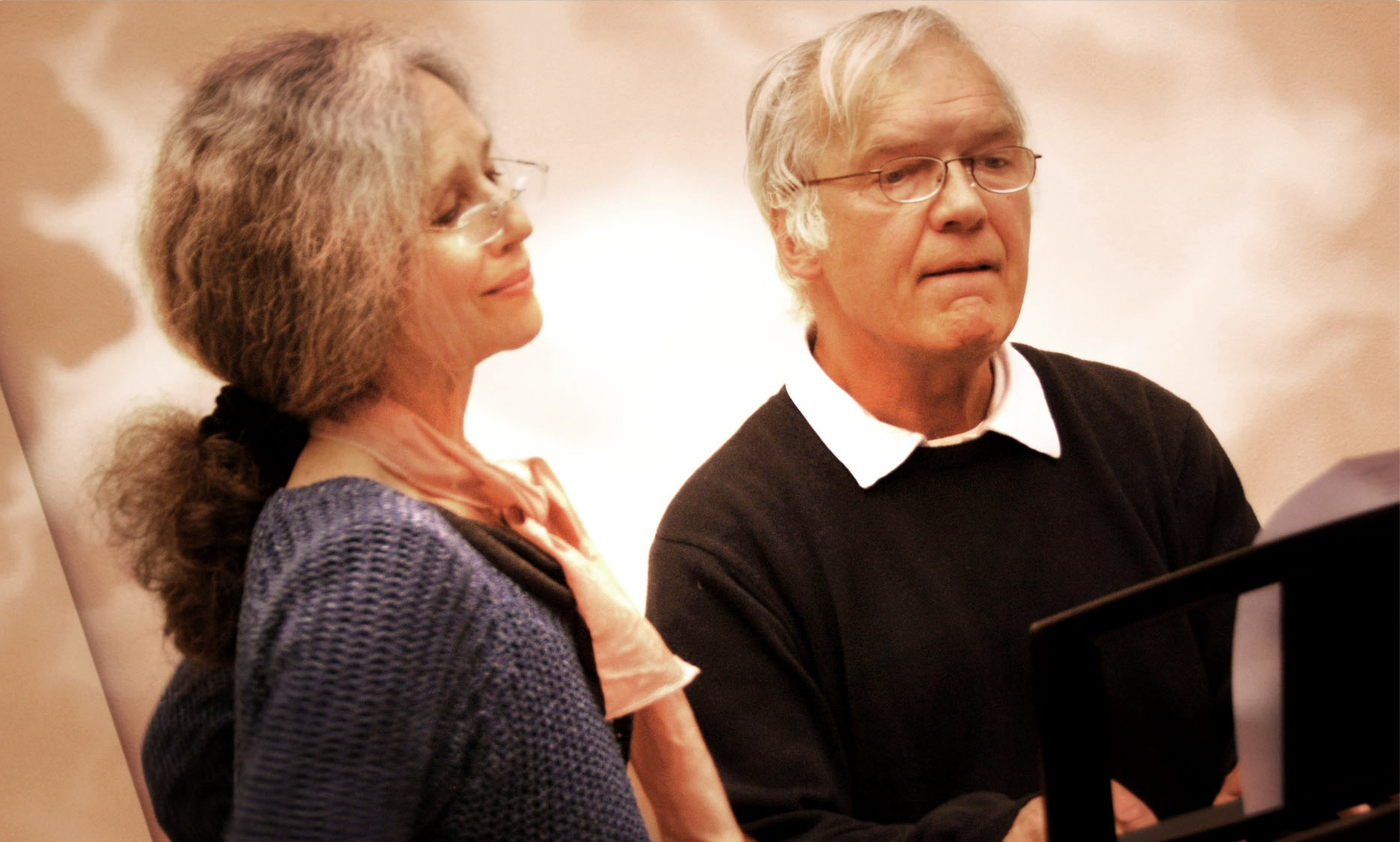 Táňa Fischerová a Daniel Dobiáš v Jihlavě